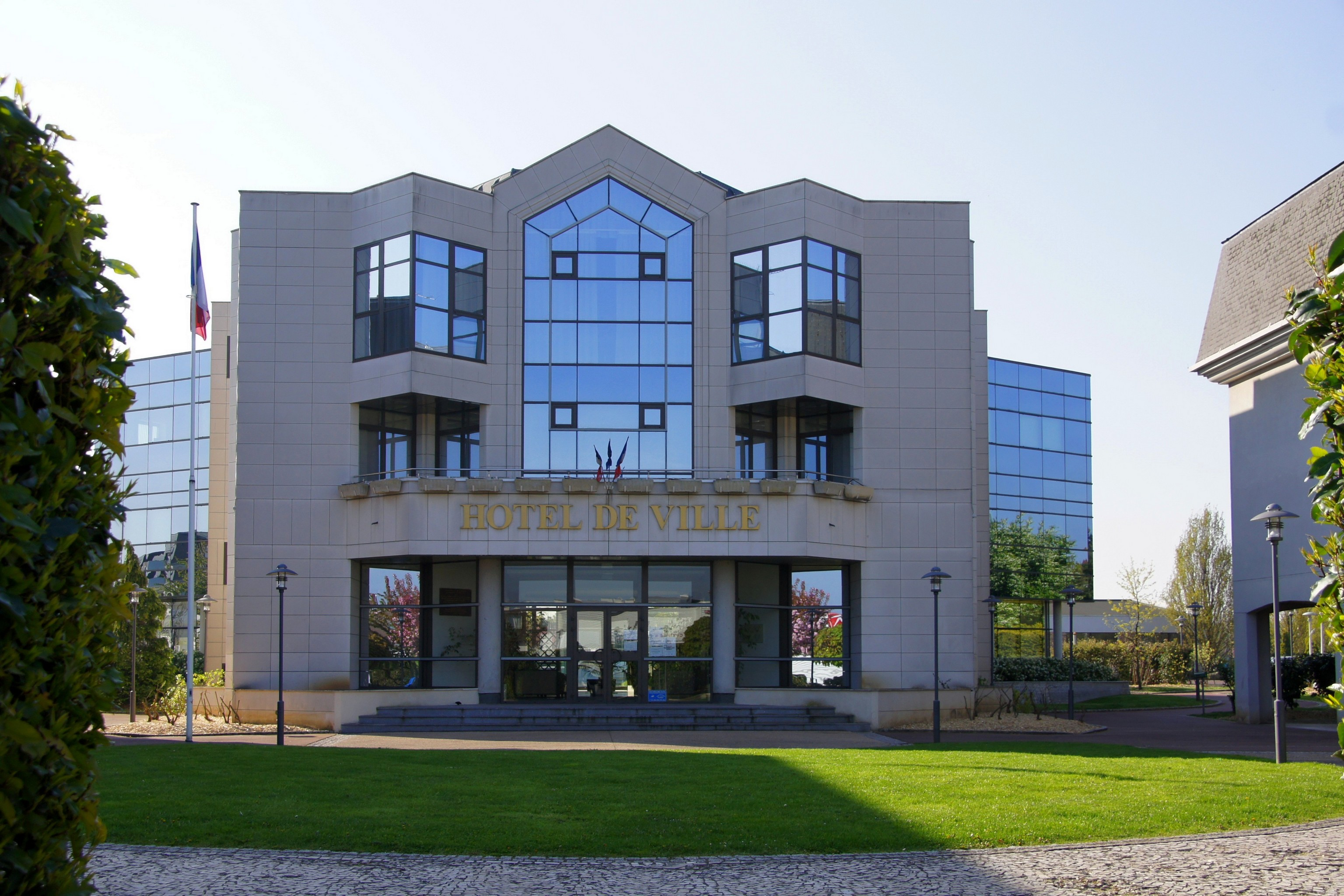 Mairie de Noiseau, France